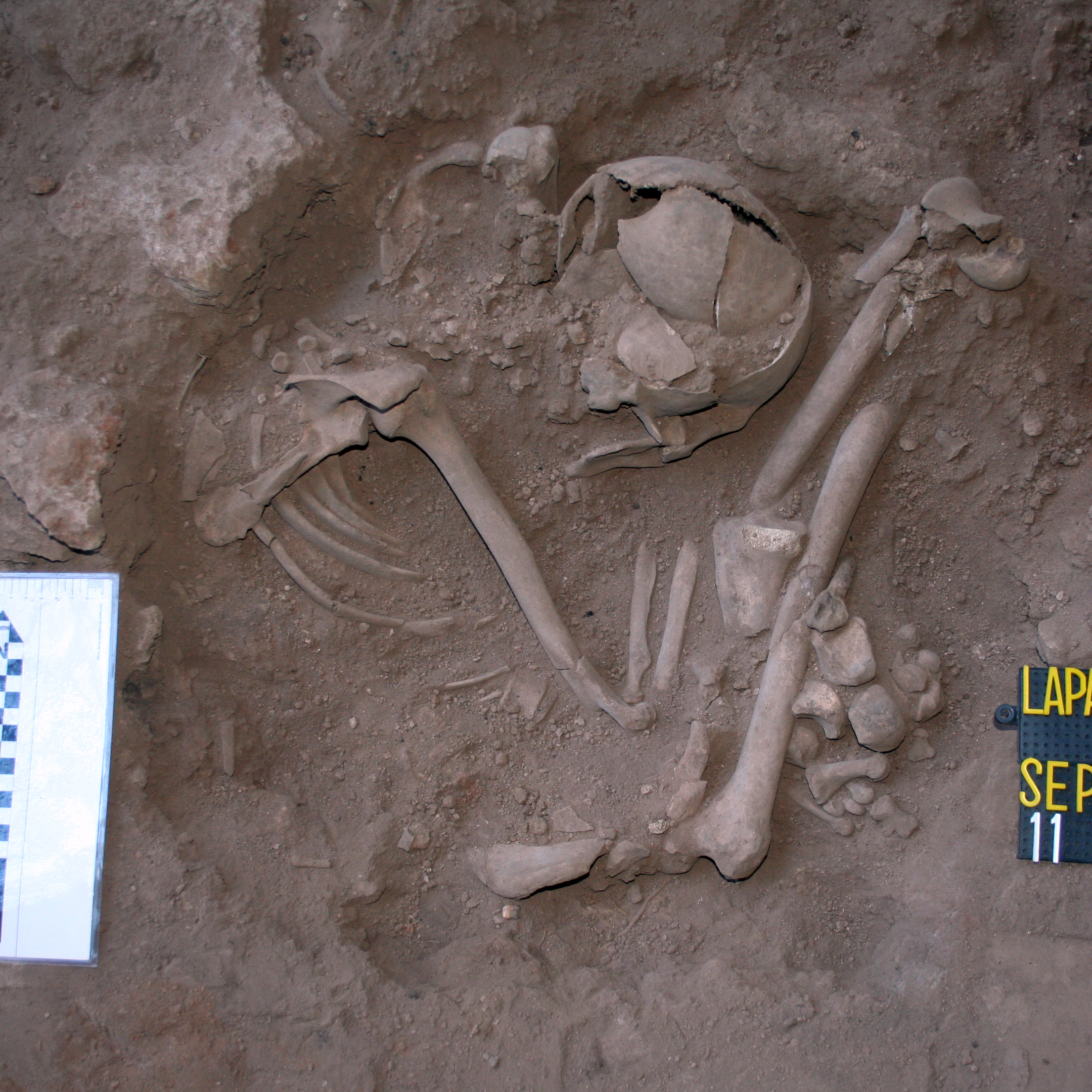 Lapa do Santo - Sepultamento 21 - Foto de Campo da Exposição 2